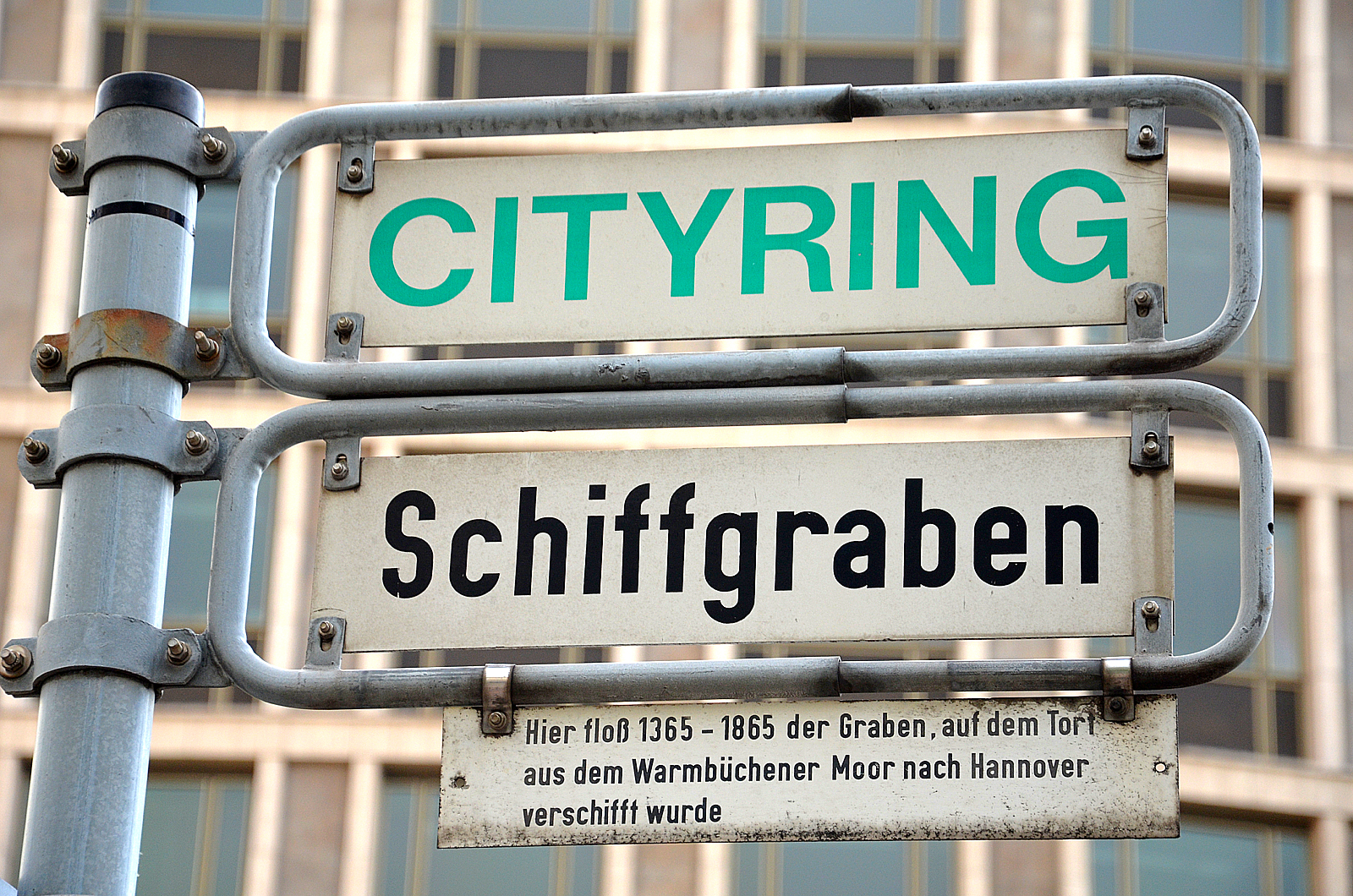 Straßenschild am Schiffgraben, nach dem Zweiten Weltkrieg als Teil des Cityrings um das Zentrum Hannovers ausgebaut, mit Legendentafel: „Hier floß 1365 – 1865 der Graben, auf dem Torf aus dem Warmbüchener Moor nach Hannover verschifft wurde“ ...